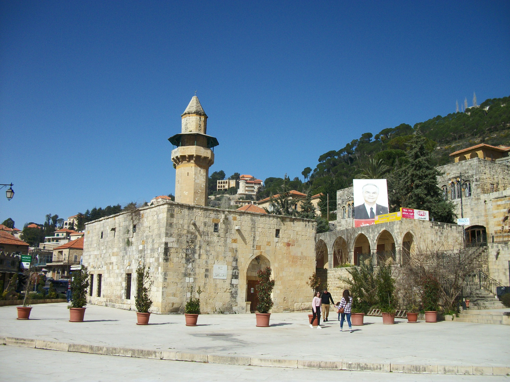 Mosquée Fakhreddine construit par Fakhr-ad-Din en 1493 et restauré au XVIe siècle par l'émir du même nom